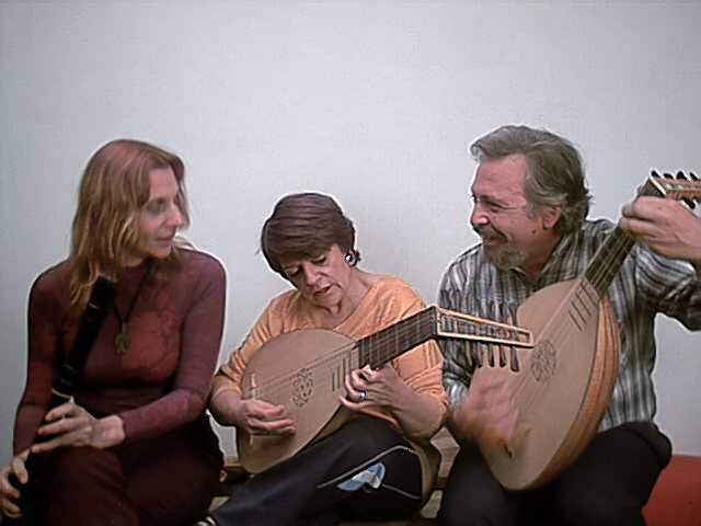 grupo Musica Antigua Res Facta